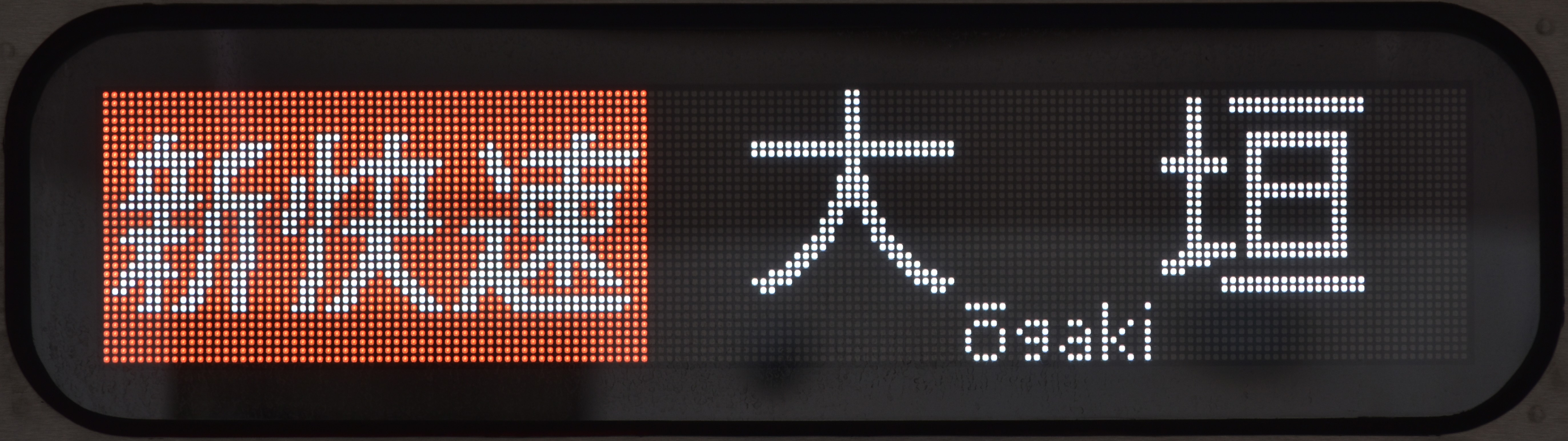 313系のLED行先表示。新快速 大垣行。